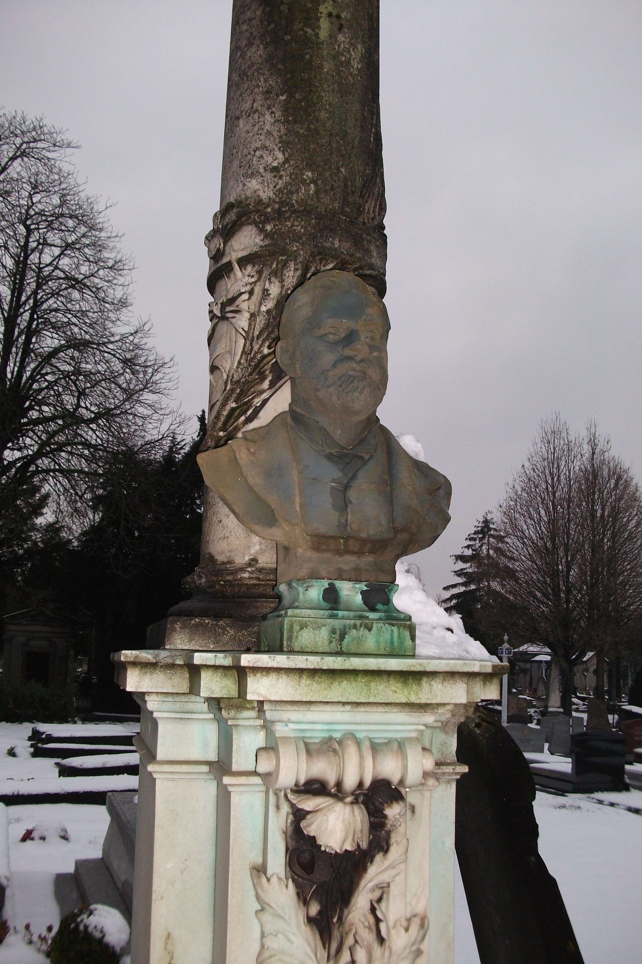 Buste de Isaac_Holden présenté au cimetière du nord de Reims. Ne pas confondre avec son oncle Sir Isaac Holden, 1st Baronet